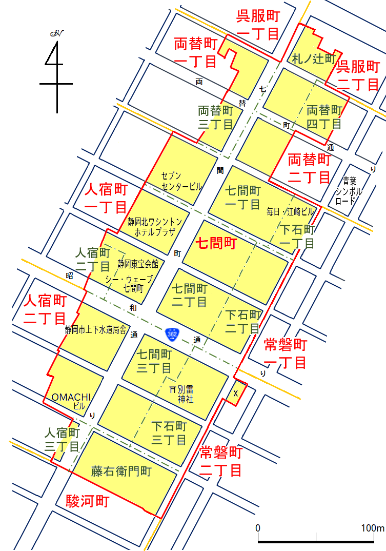 赤線内の黄色の面・・・現在の七間町の町域 赤字・・・七間町周辺の現在の町名 黄線・・・現在の町界 青線・・・公道 黒字・・・町内の主要施設名 緑色の一点鎖線・・・旧町界 緑字・・・旧町名 旧町名、町界は1932年発行「静岡市全図」を、現在の町界はウェブ地図サイト等を基に本人が作成。